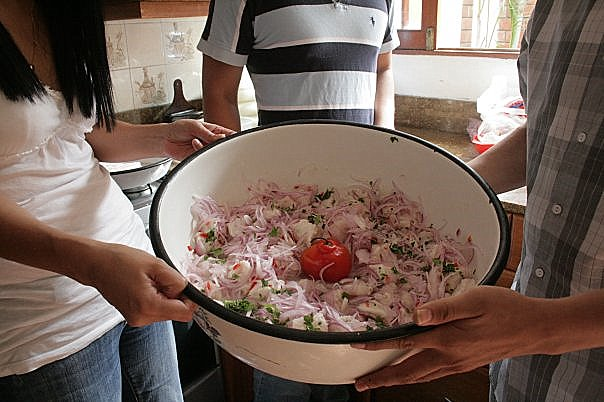 Fuente de ceviche peruano hecha para una reunión familiar. Lima, Perú.